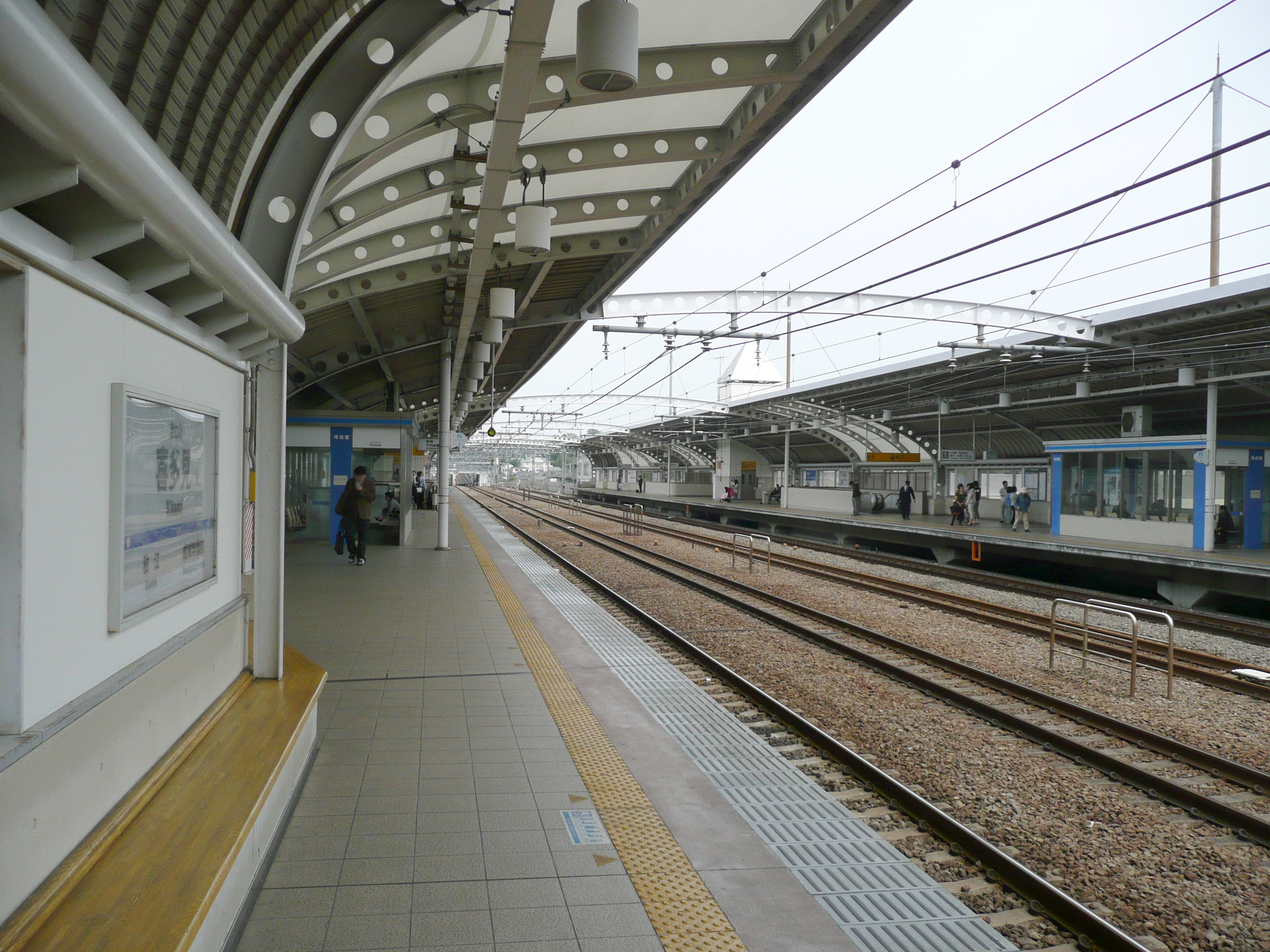 喜多見駅ホーム